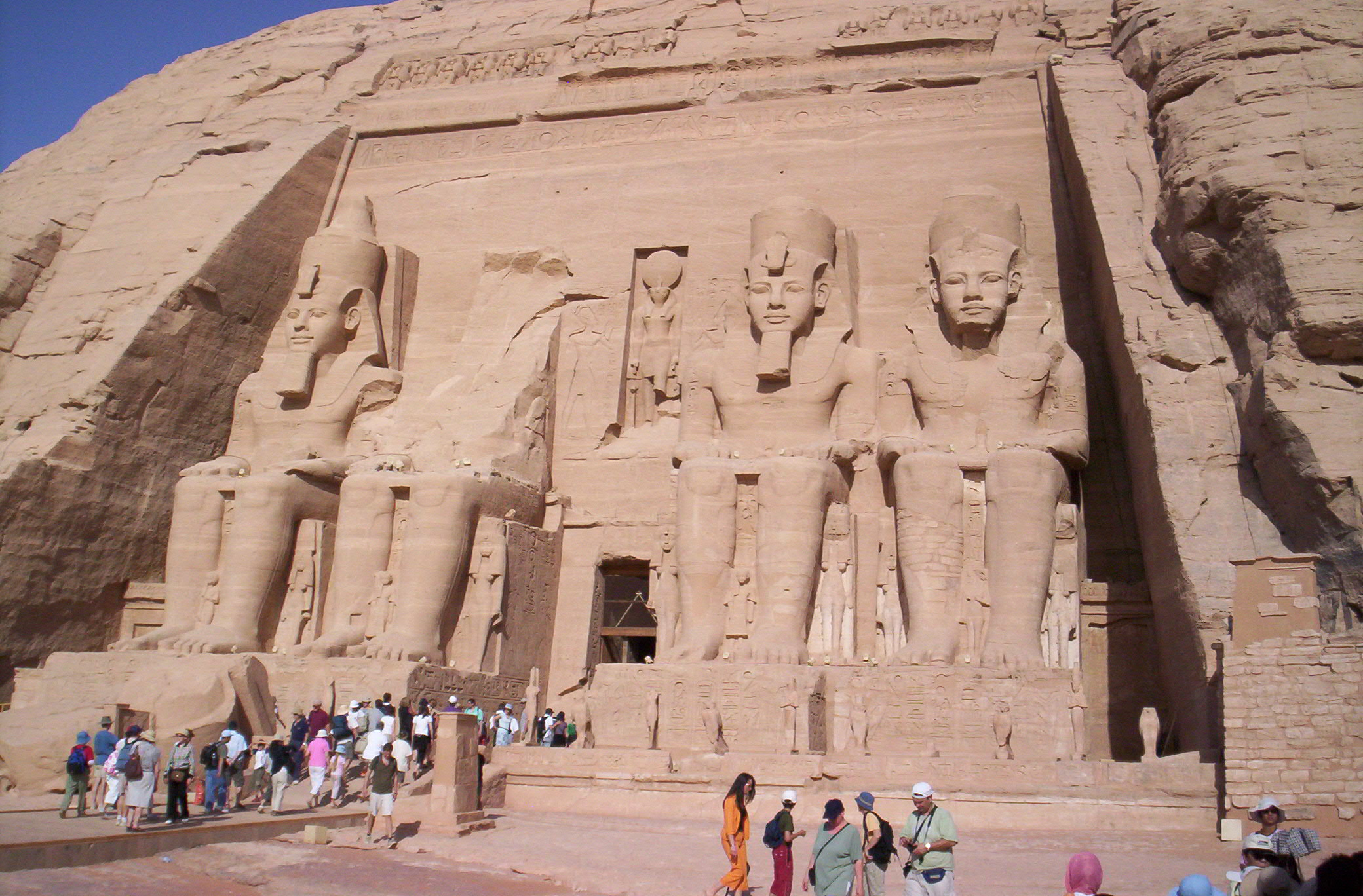 Vorderansicht des Großen Tempels von Abu Simbel